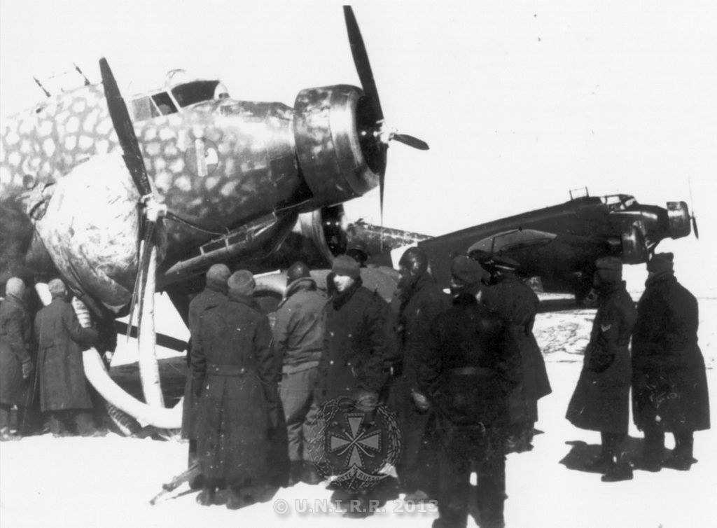 Savoia-Marchetti SM.81 Pipistrello - Russia 1942